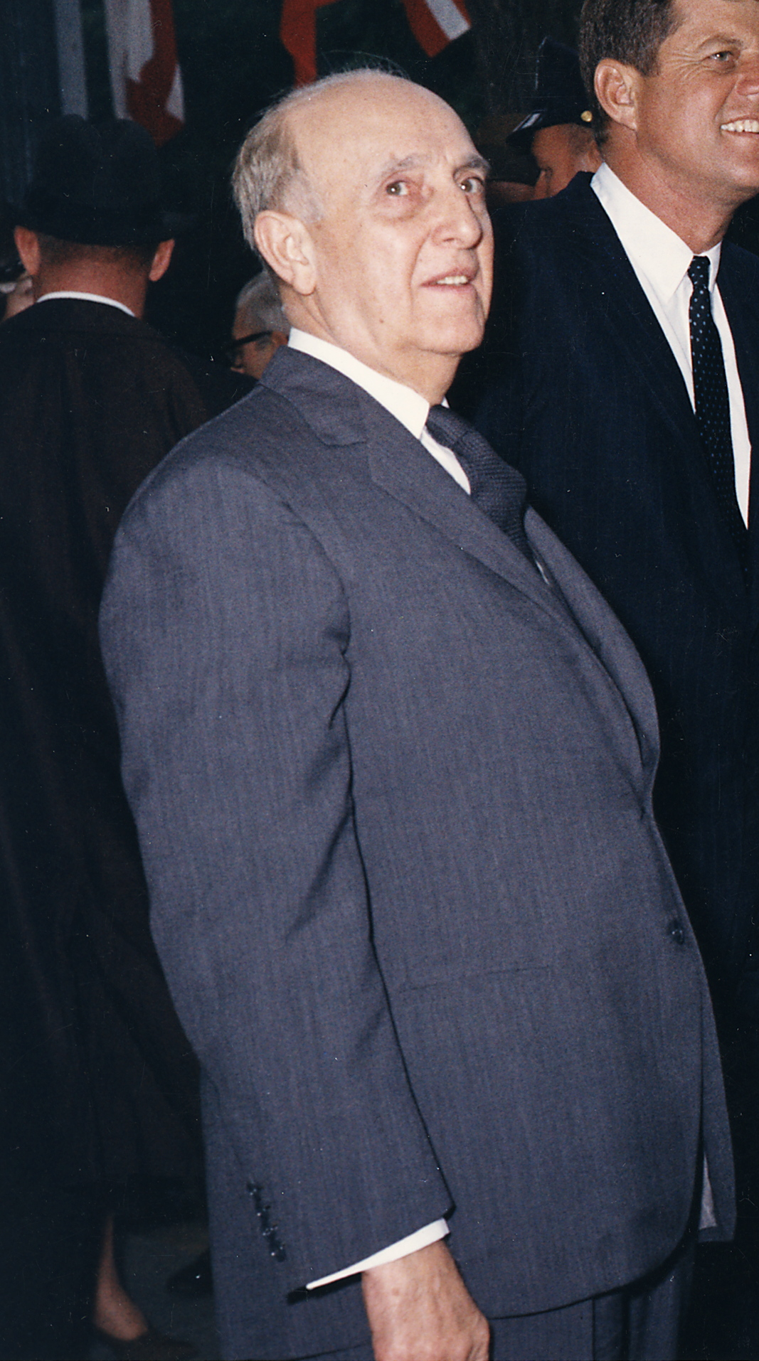 President Don Manuel Prado